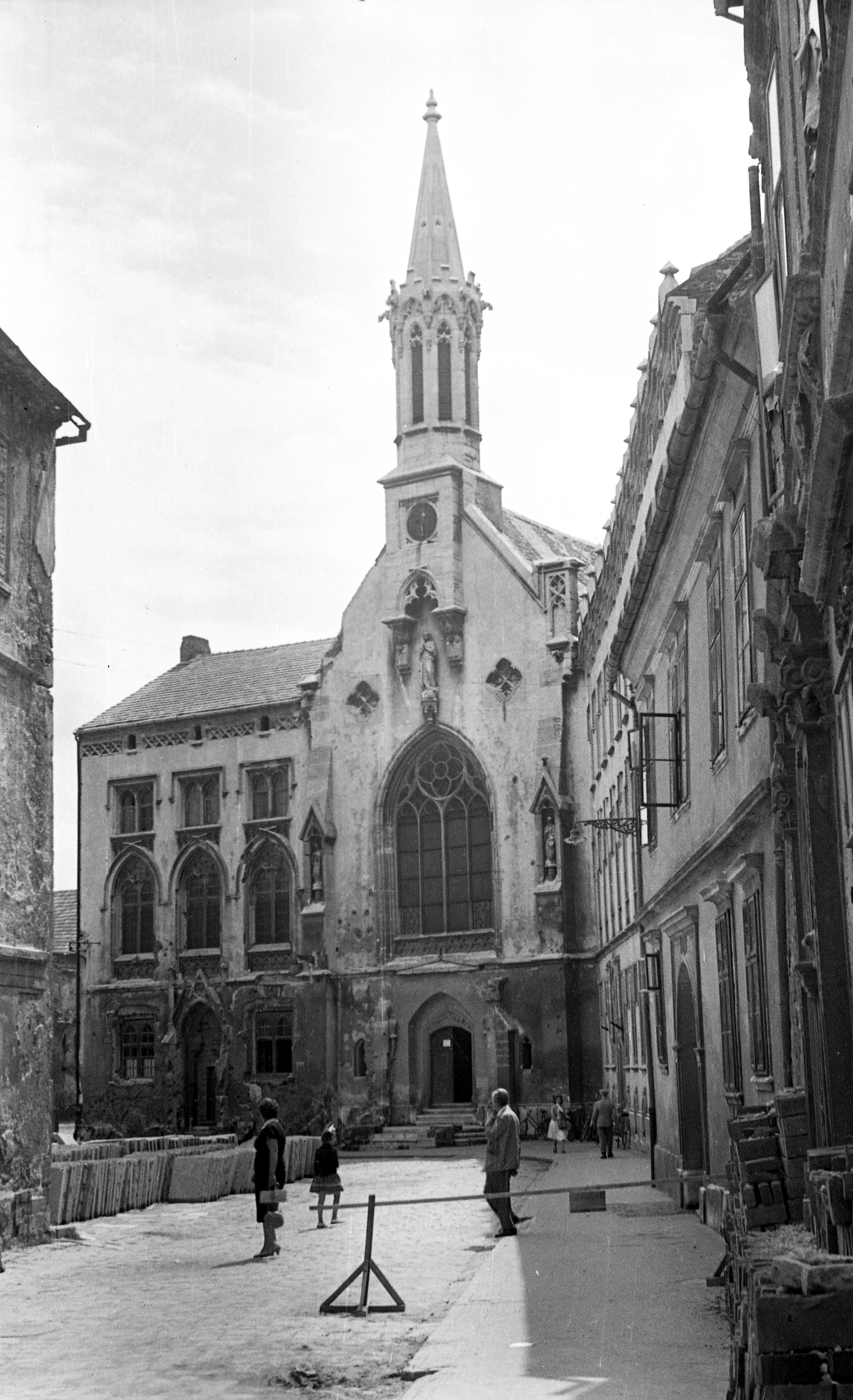 Szent Orsolya-templom és rendház a Fegyvertár utcából nézve. Location: Hungary Title: Szent Orsolya-templom és rendház a Fegyvertár utcából nézve.